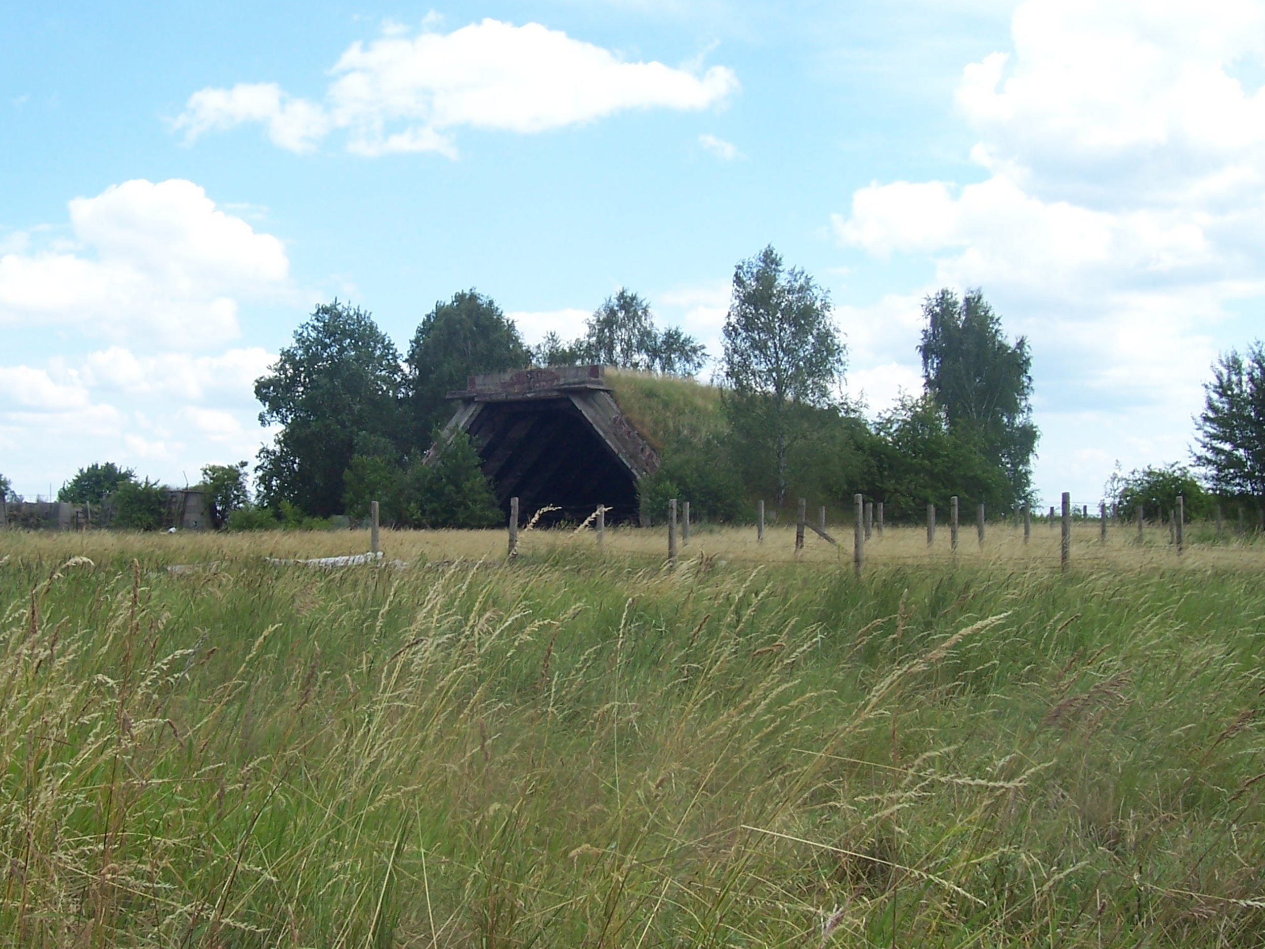 Ehemaliger Hangar am Flugplatz Werneuchen